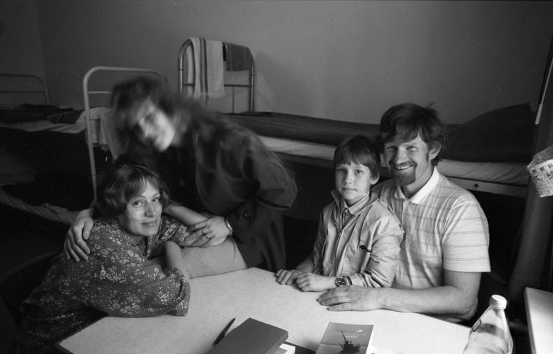 Juni 1988 Friedland Grenzdurchgangslager für Aussiedler und Flüchtlinge Eine Familie aus Sibirien